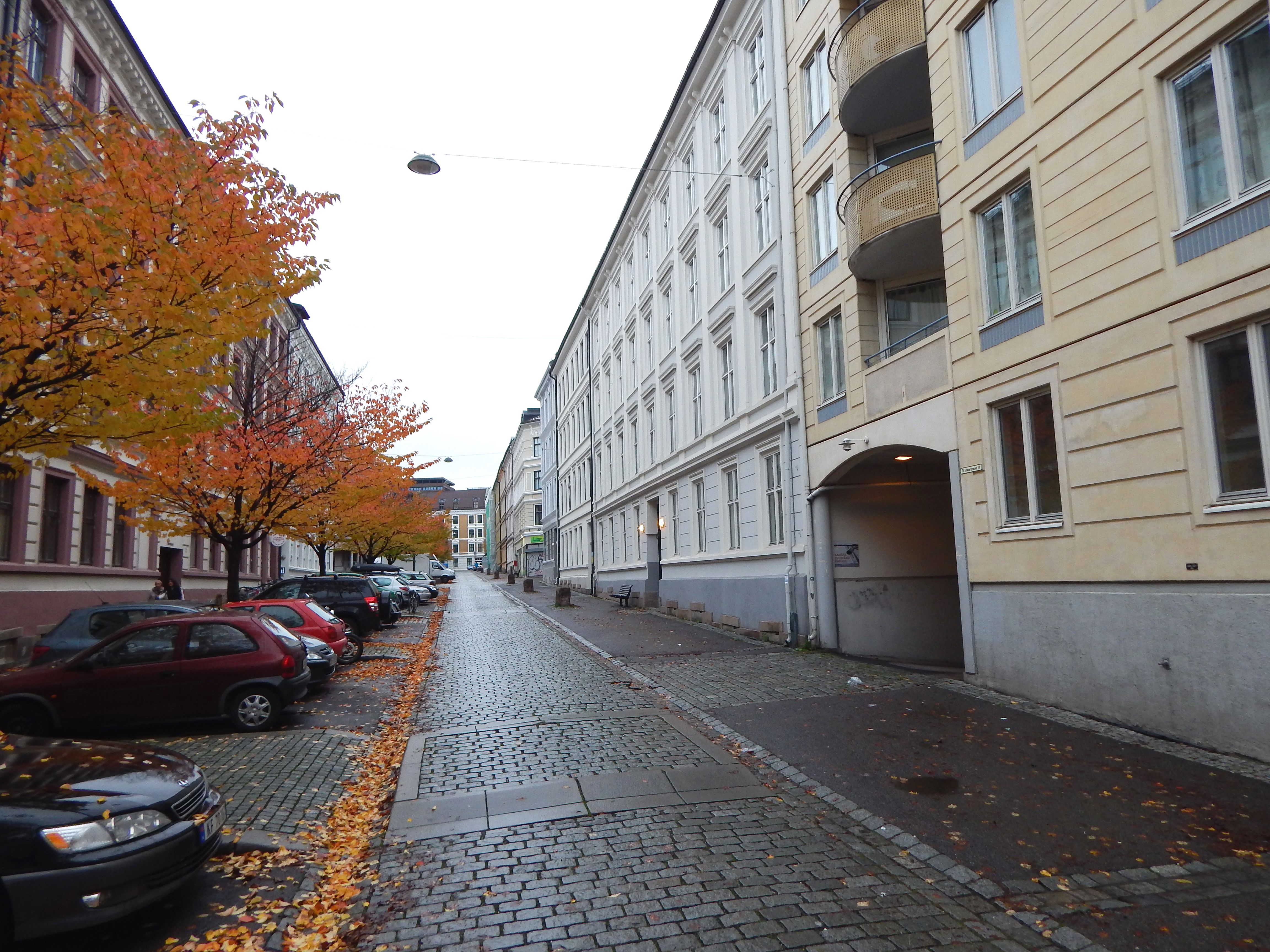 Eiriks gate sett fra Åkebergveien